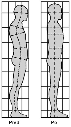 Pred a po terapii Rolging